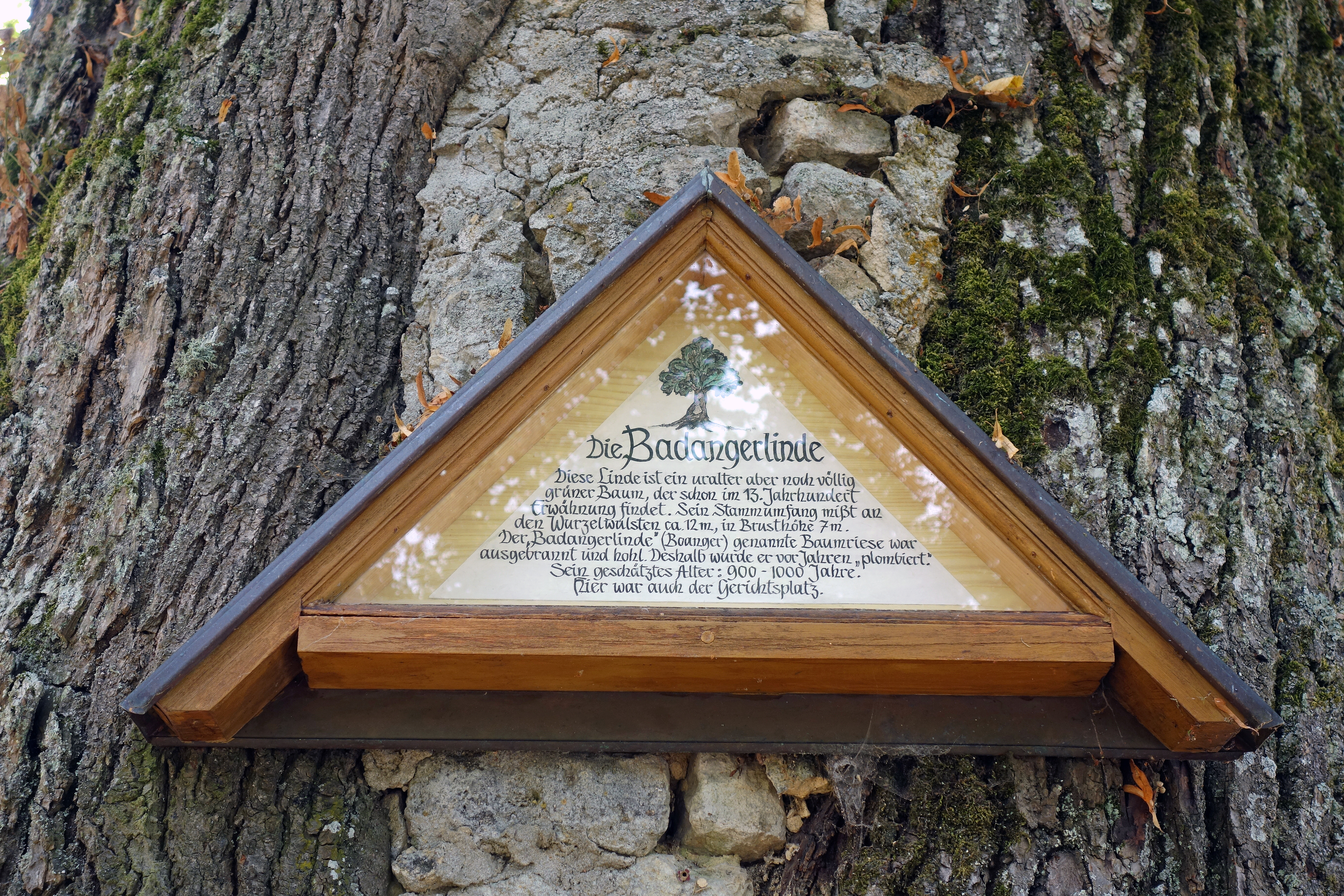 Badangerlinde